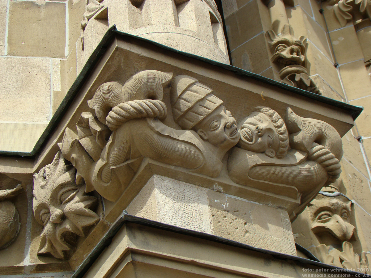 Turm der Kilianskirche in Heilbronn